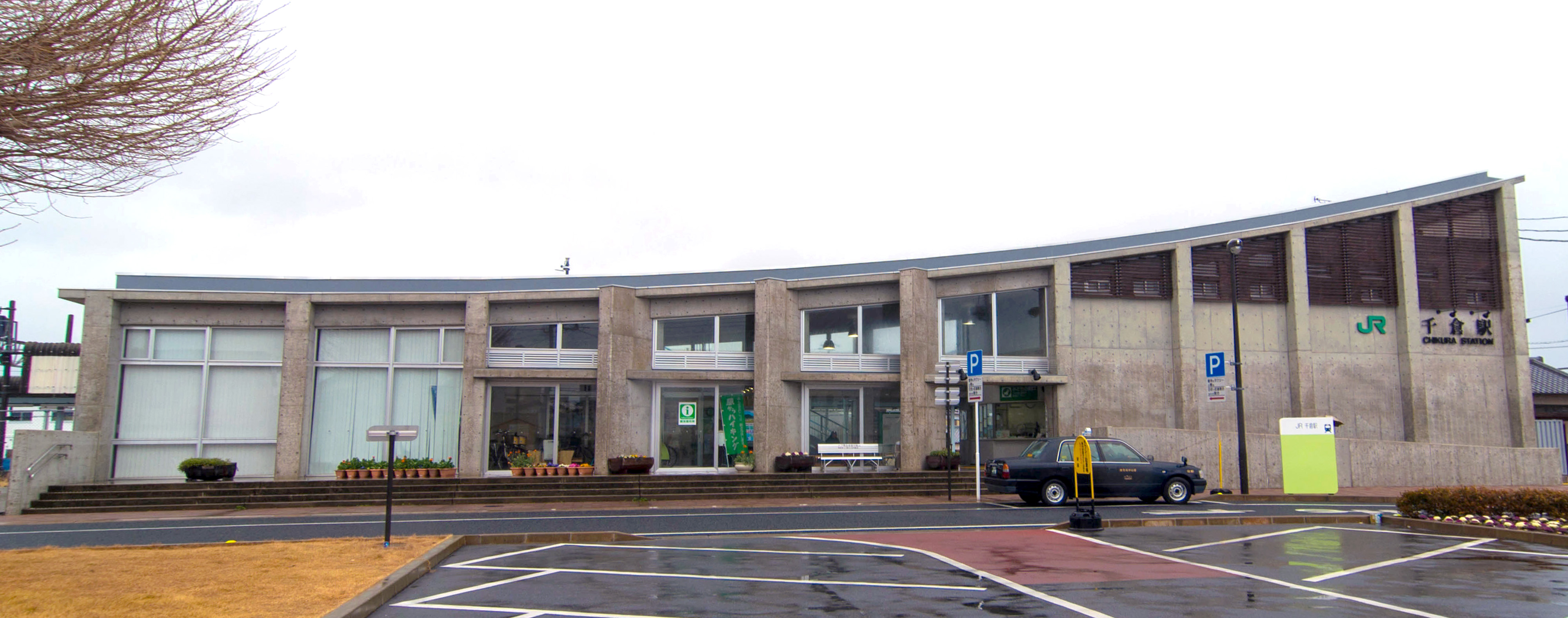 東日本旅客鉄道株式会社内房線千倉駅駅舎